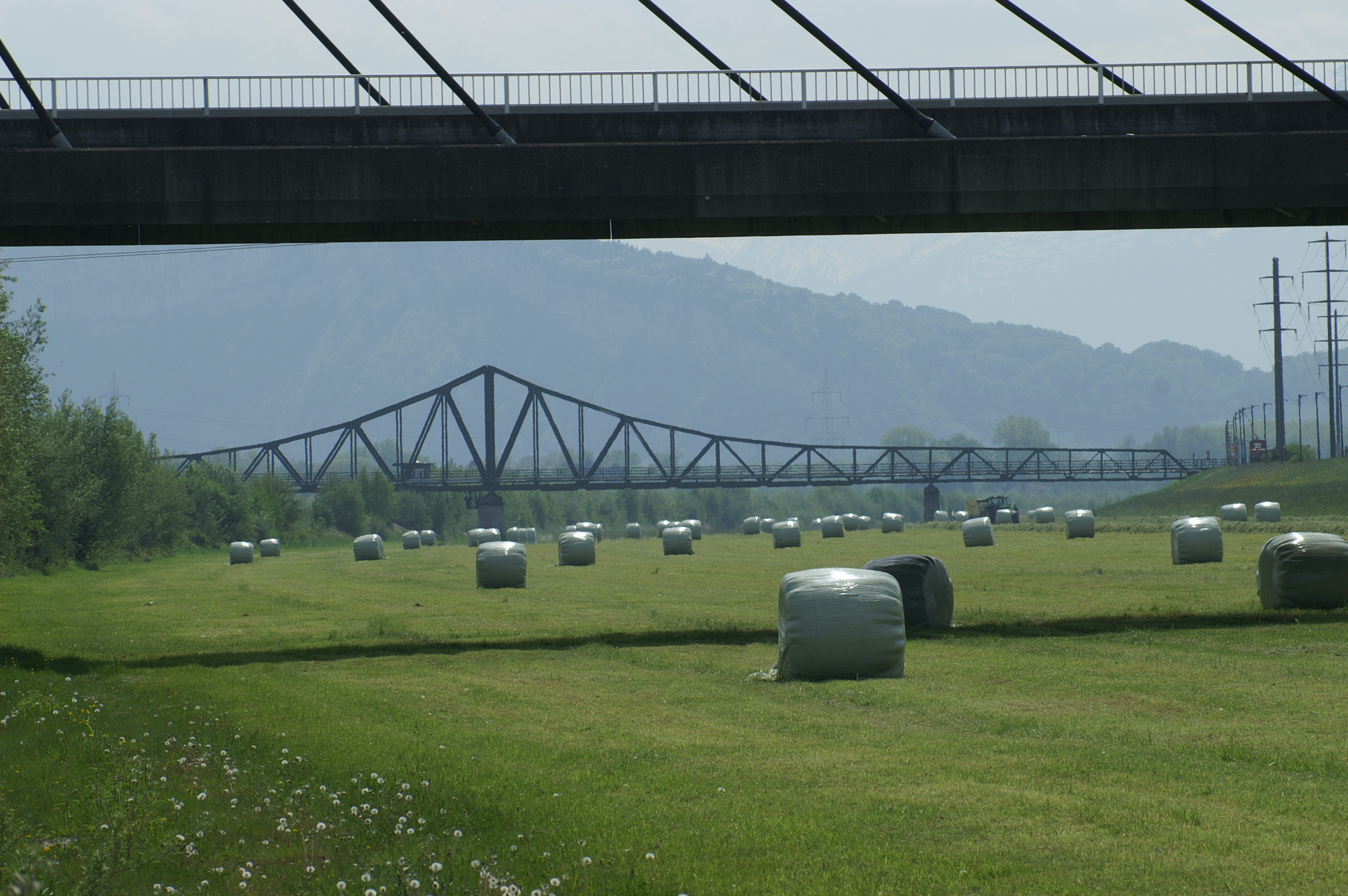 Grassilage im Rheinvorland bei Diepoldsau